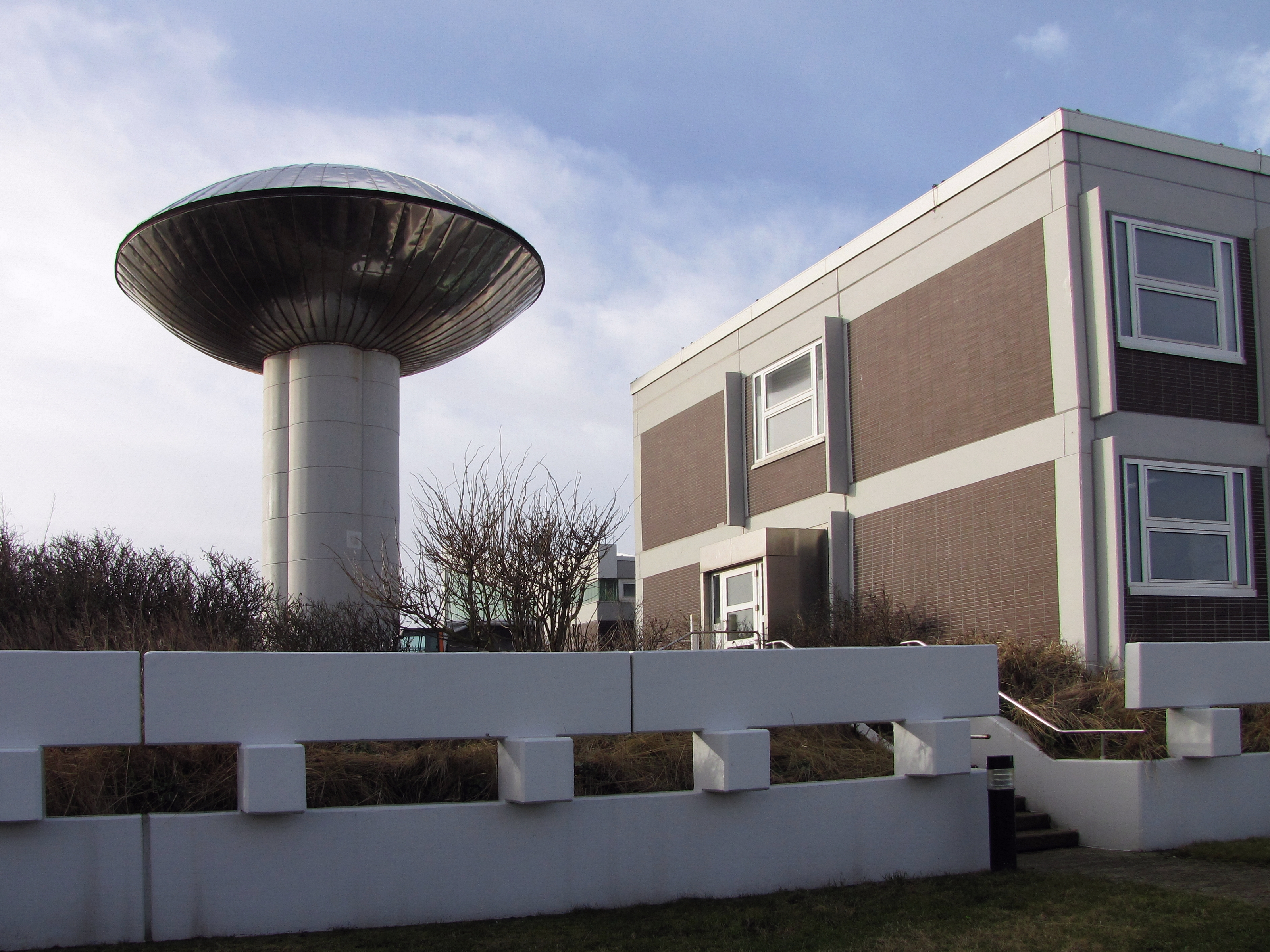 Biologische Anstalt Helgoland (BAH), Meerwasserturm zur Versorgung der Öko-Laboratorien mit Meerwasser